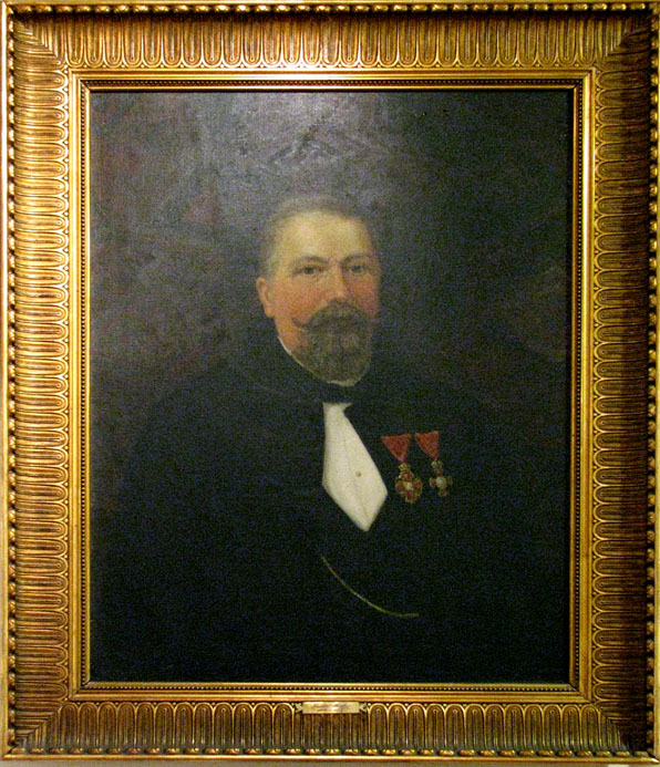 Pavao Hatz ml., ulje na platnu, slikarica Nasta Rojc, Zagreb, 1914., Muzej grada Zagreba